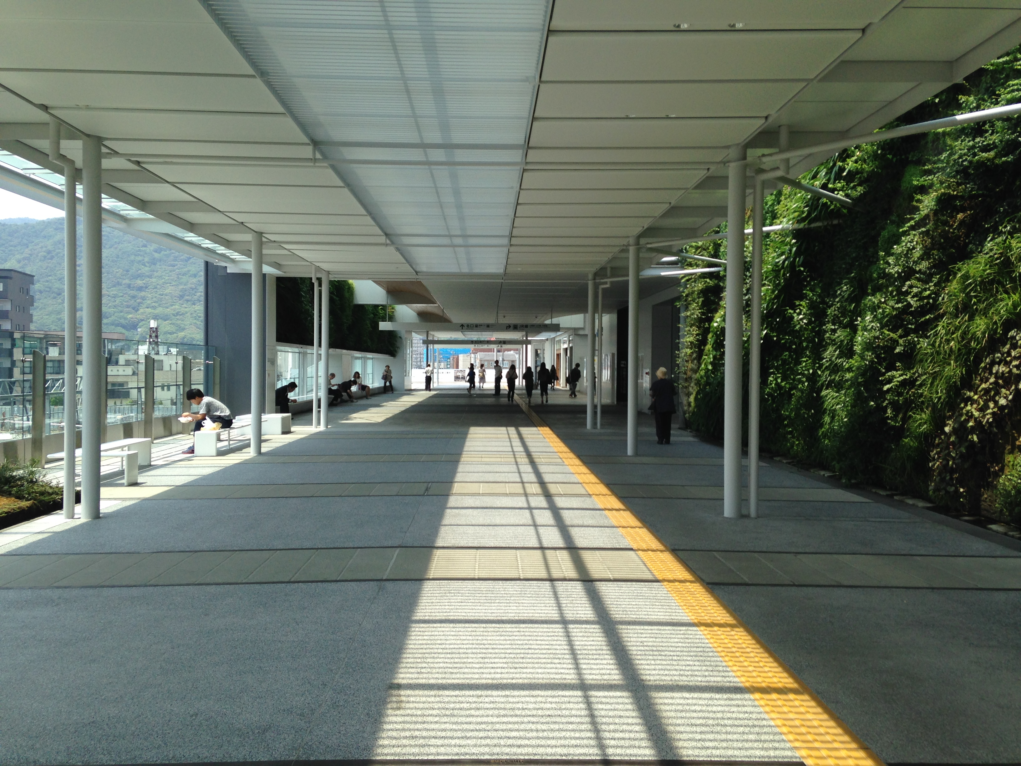 新山口駅の改札外通路